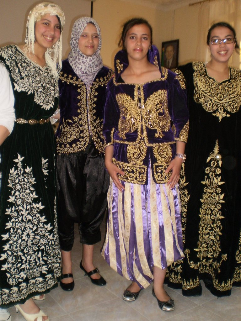 Habit féminin traditionnel revêtu à l'occasion par de jeunes lycéennes de l'établissement El Feth de Blida.